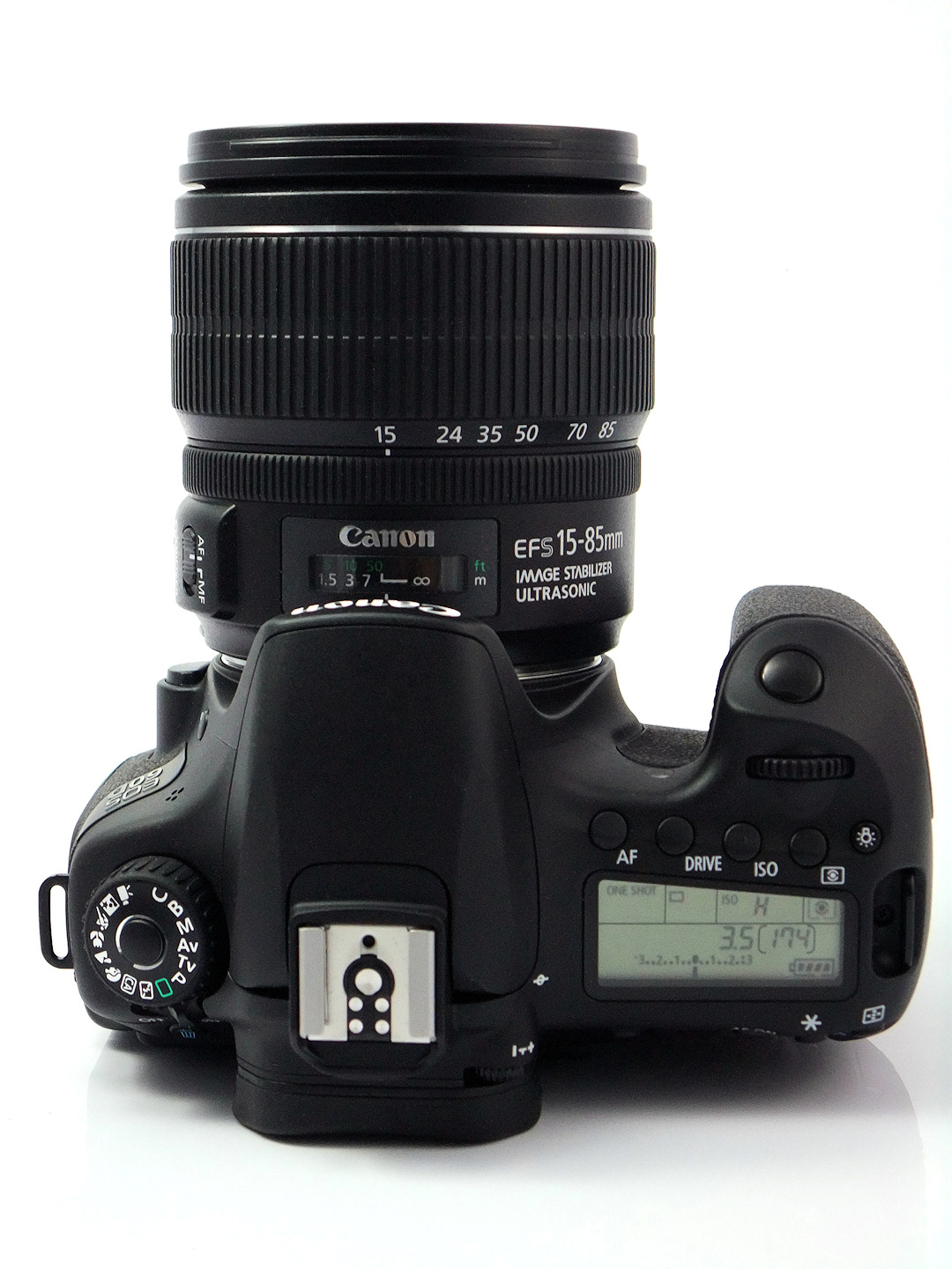 Canon EOS 60D vue de dessus